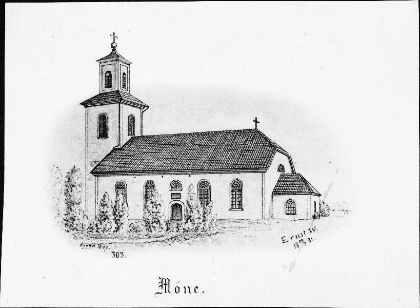 Den äldre kyrkan från sydöst, uppförd 1847 och nedbrunnen 1947. Tryck efter teckning av Ernst Wennerblad 1881. Kategori: (01) ExteriörerDen äldre kyrkan från sydöst, uppförd 1847 och nedbrunnen 1947. Tryck efter teckning av Ernst Wennerblad 1881.